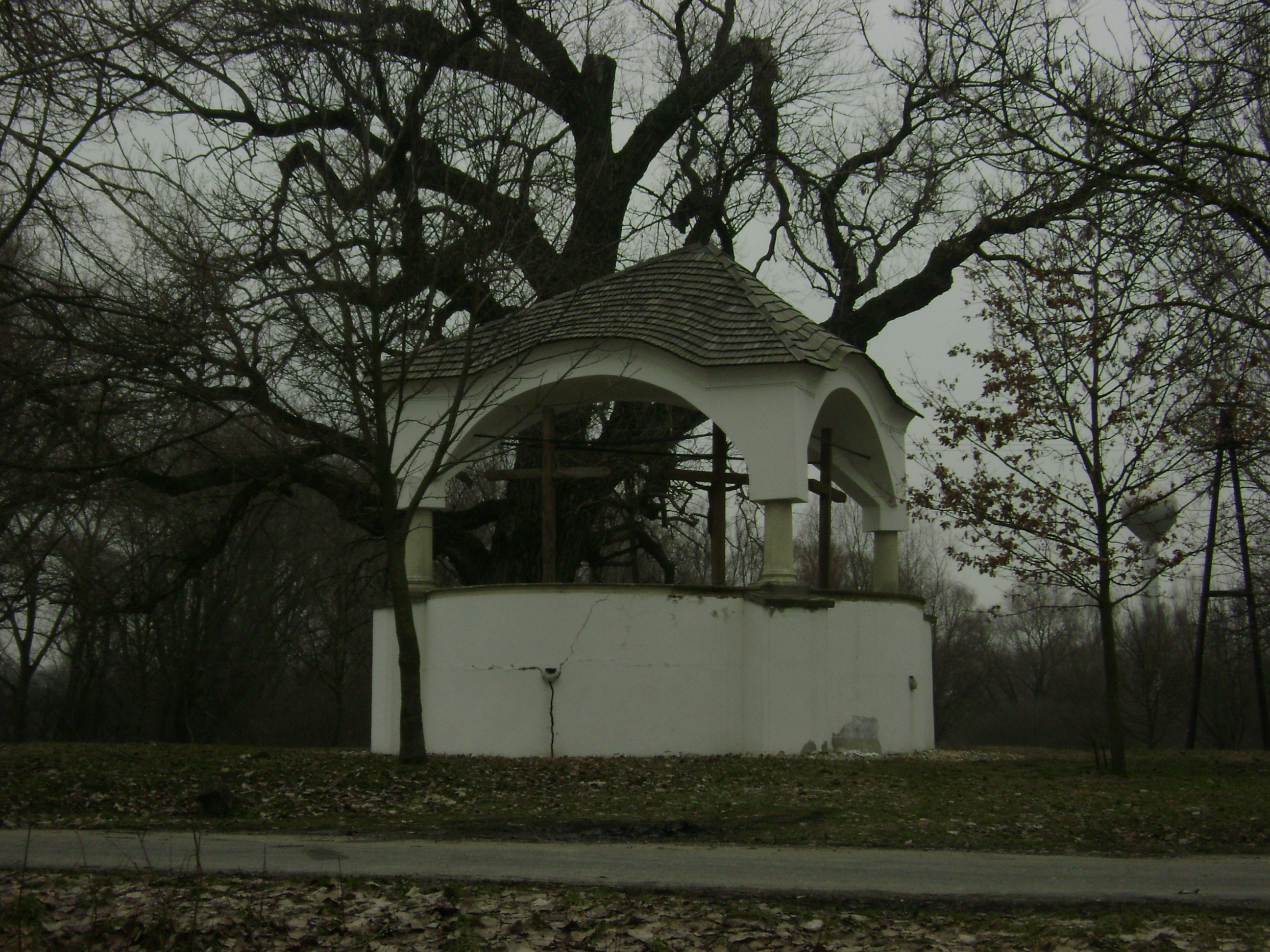 A kálvária 2013-ban a 1401-es műút mellett